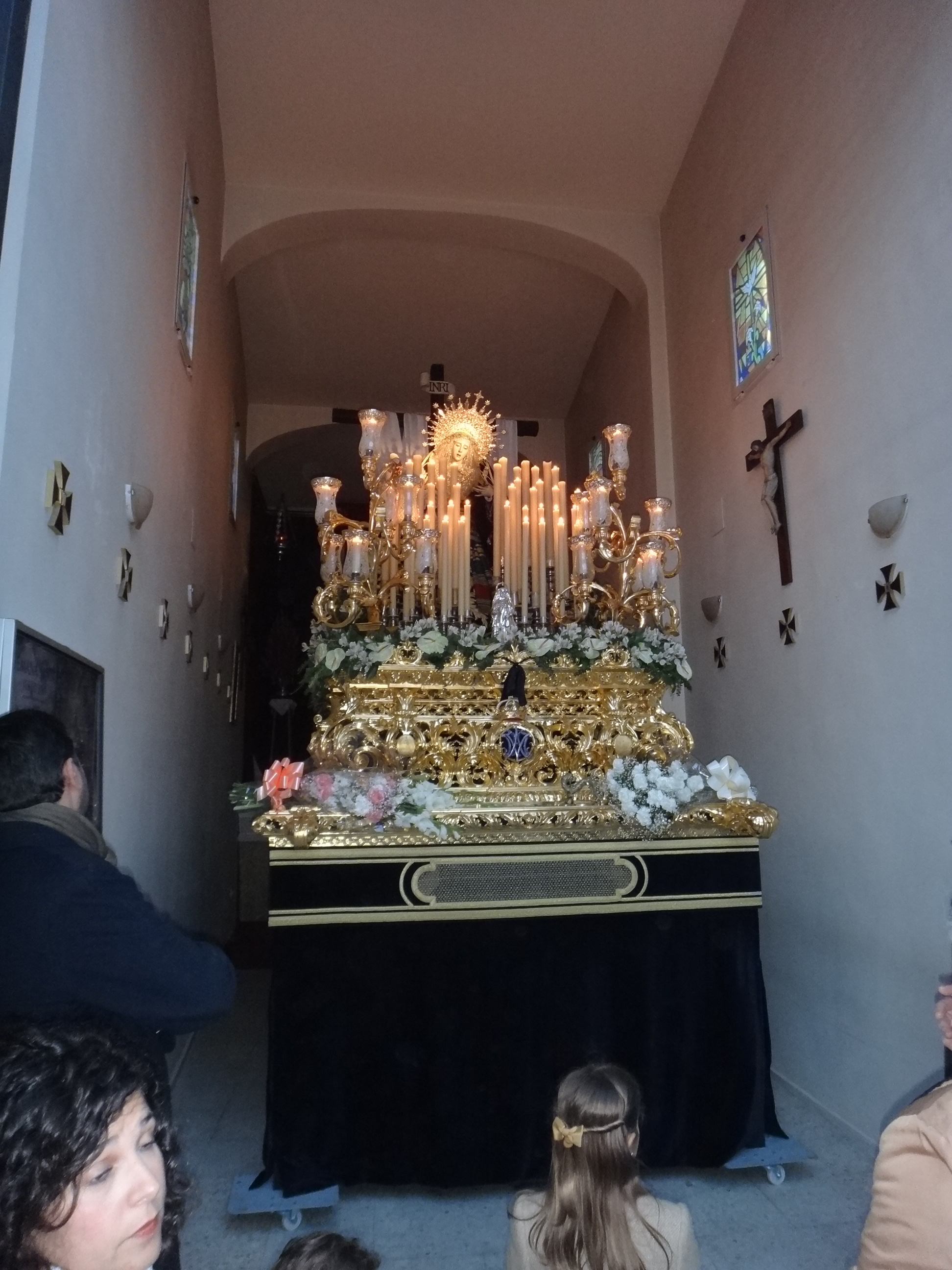 María Santísima del Consuelo. Jerez de la Frontera (Andalucía, España). Capilla del Consuelo en el barrio de El Pelirón